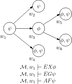 CTL model example